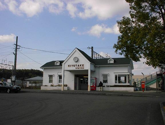 （2004年1月27日、投稿者Jnr bus撮影）